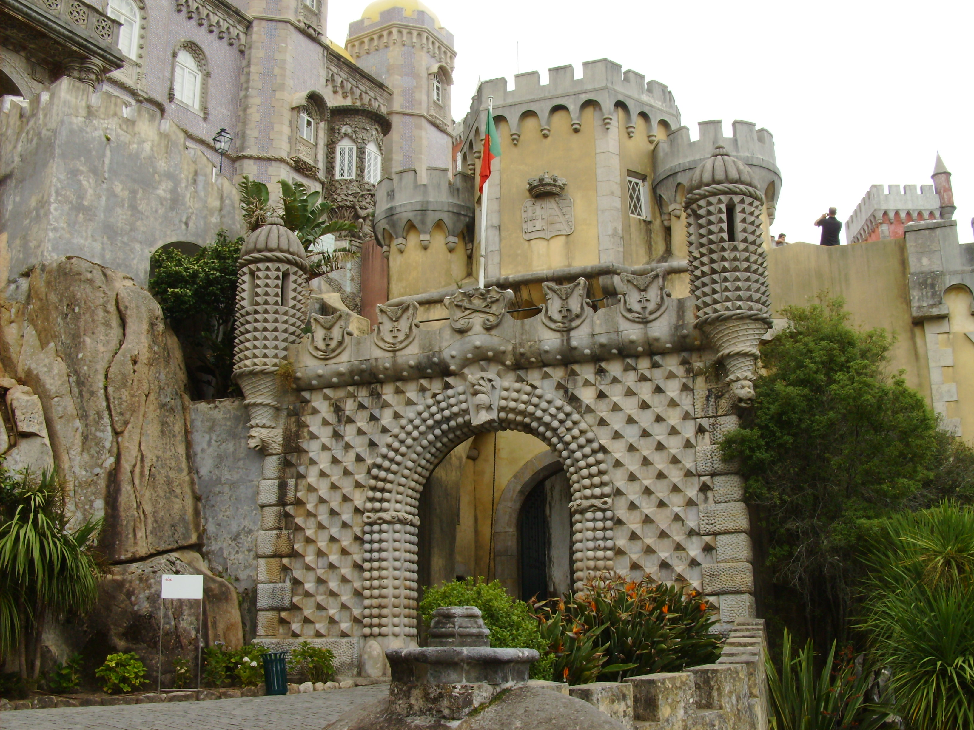 Palácio Nacional da Pena, Sintra, Portugal: Porta Férrea.